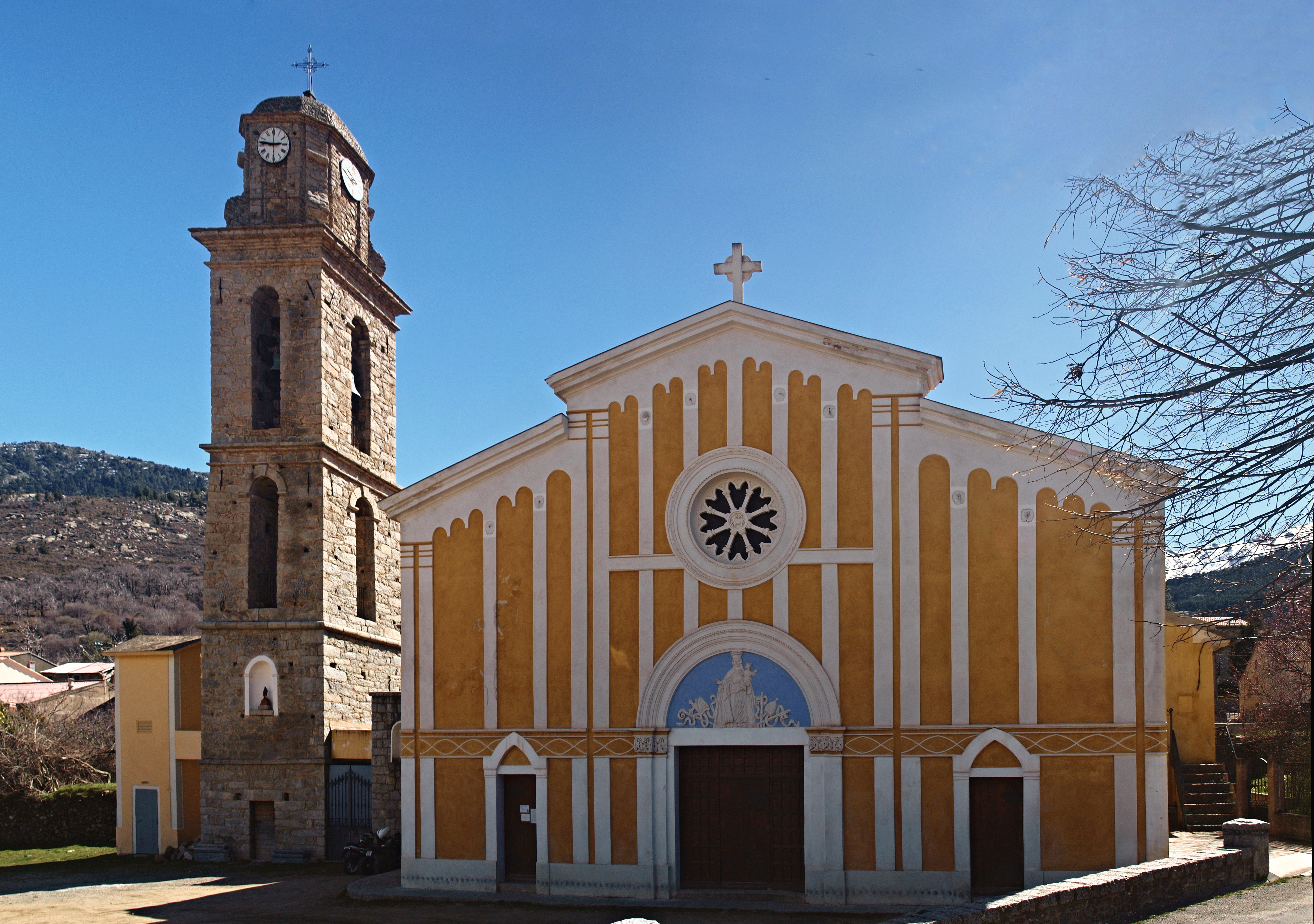 Casamaccioli (Corsica) - L'église de la Nativité